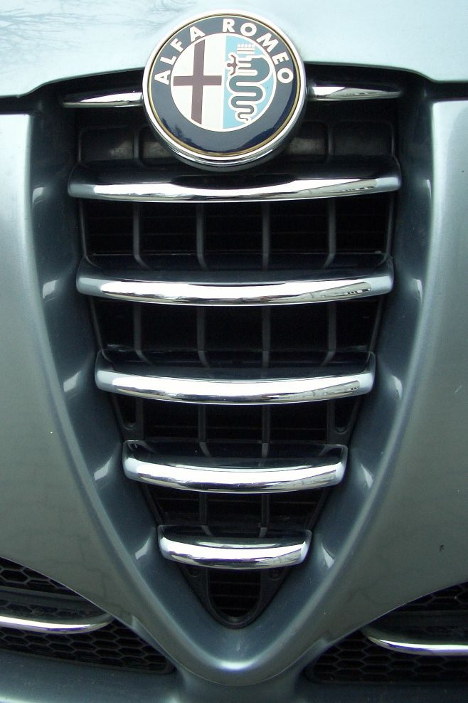 Signet auf dem Scudetto eines Alfa Romeo 147.